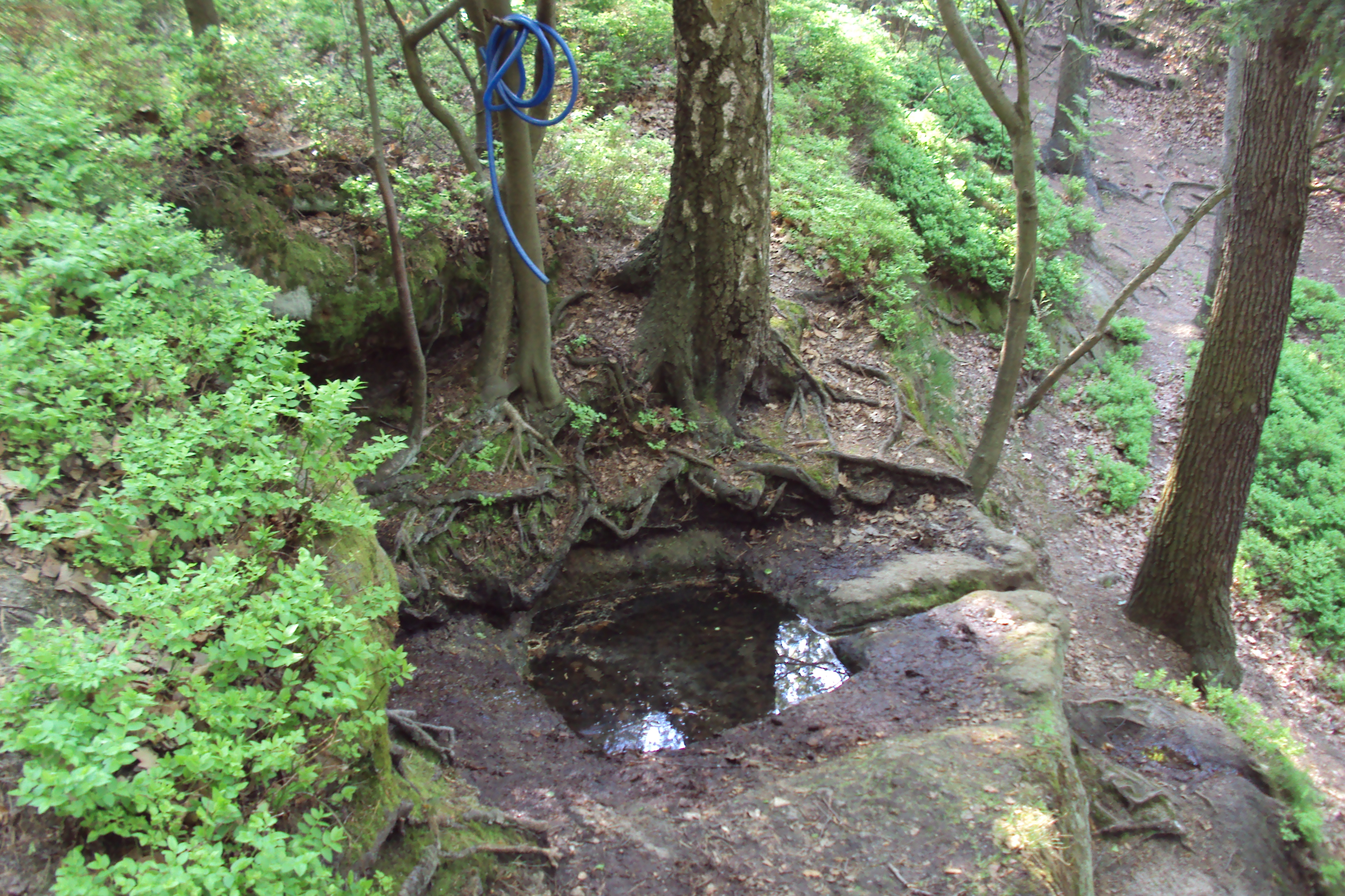 Na zelené trase z jihu od Nových Osinalic ve skalním městě u Rače je tato studánka či nádržka